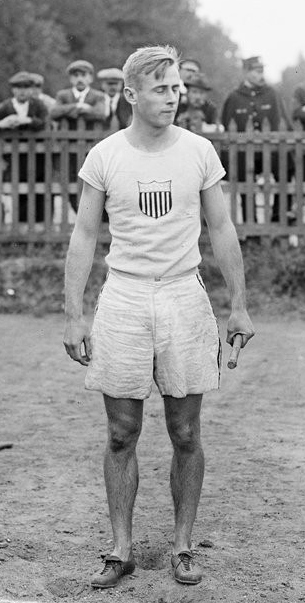 28-8-20, Colombes, départ du 400 m relais [4x400 m], Schiller (Am[érique]): [photographie de presse] / [Agence Rol]